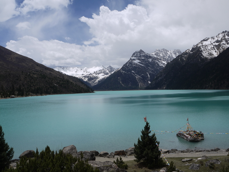 位于四川省甘孜藏族自治州德格县境内的新路海。